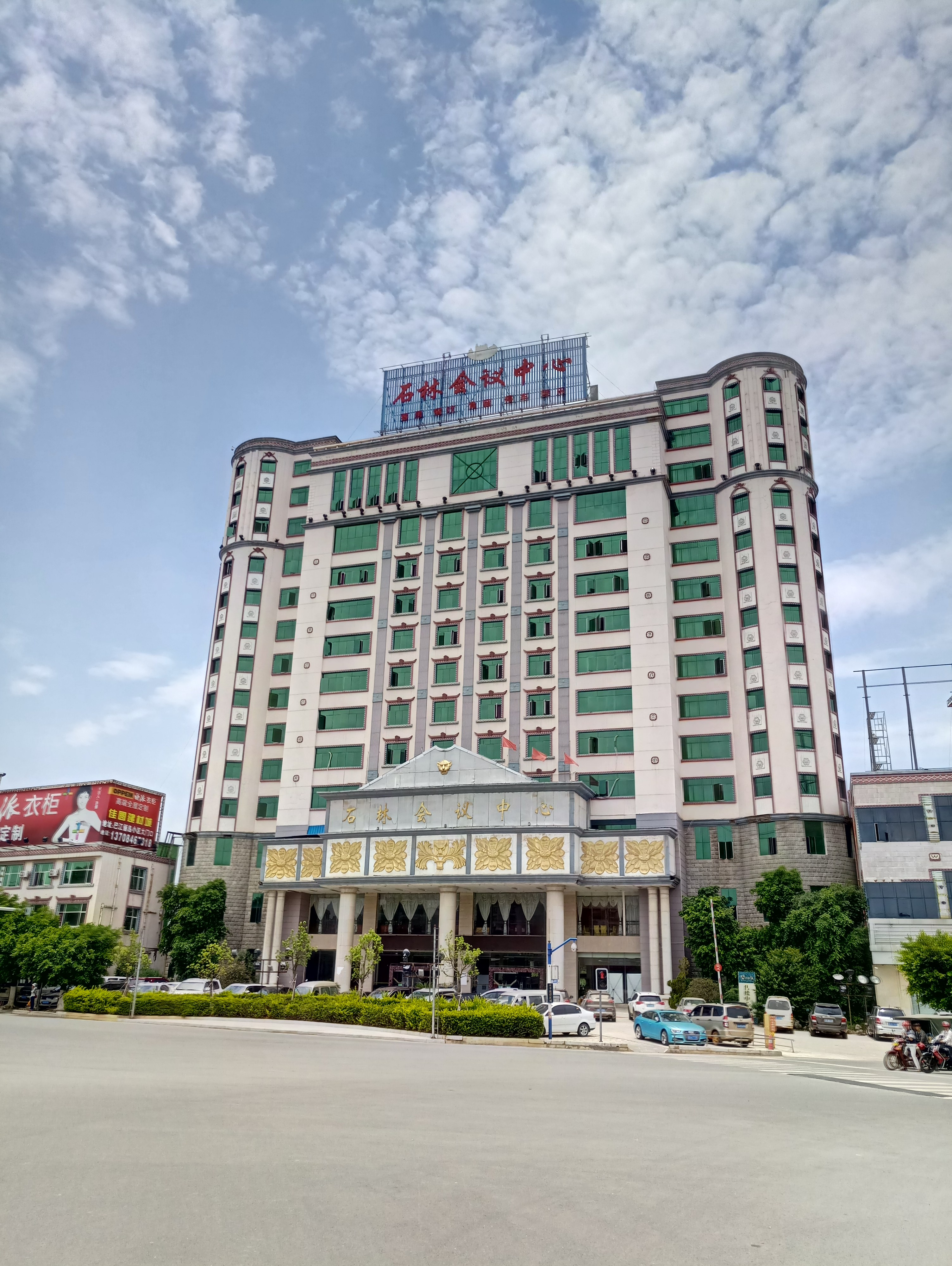 中文（中国大陆）: 石林彝族自治县会议中心